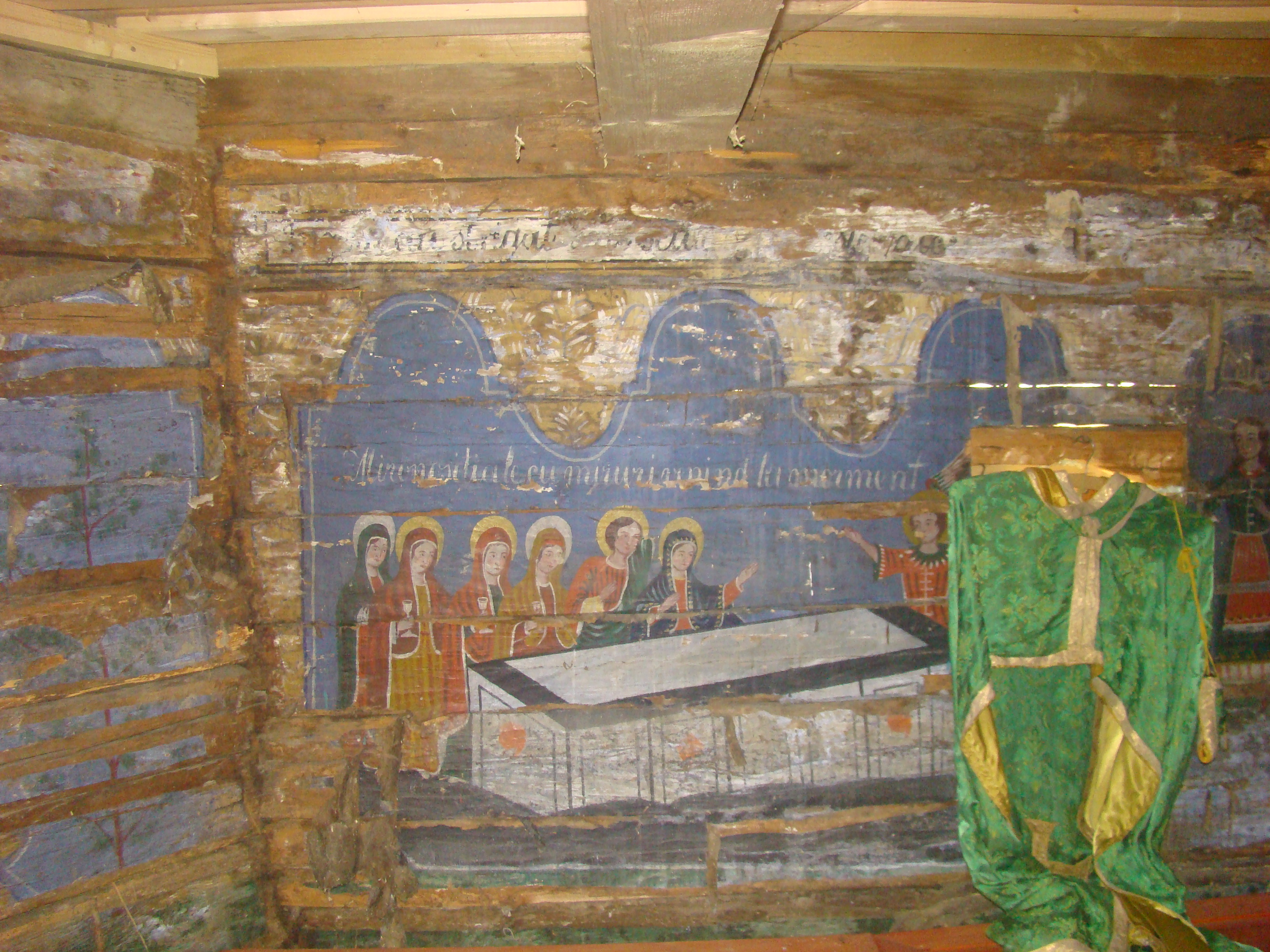 Biserica de lemn "Sfântul Petru" din Mureșenii de Câmpie